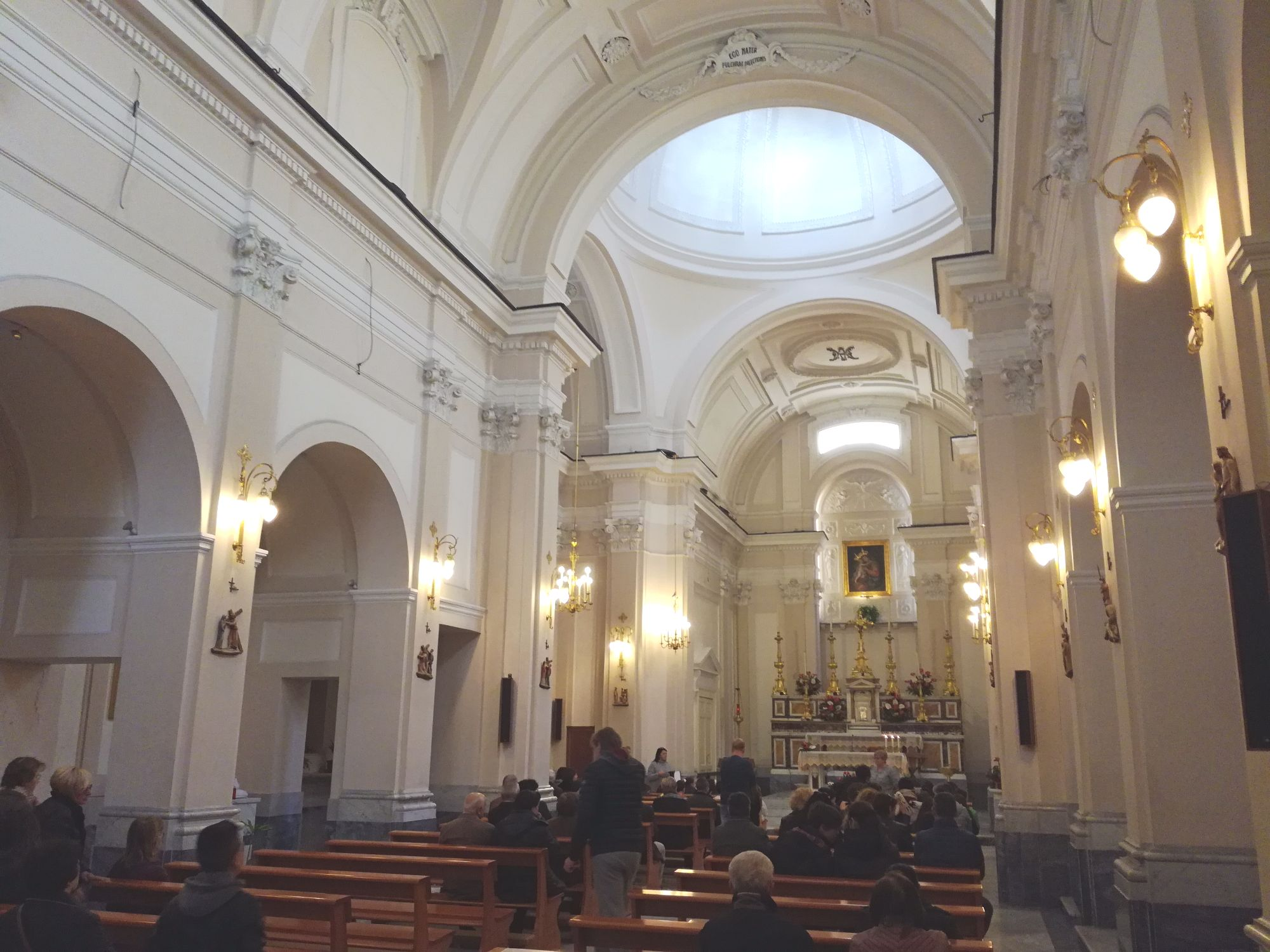 Interno della chiesa di Santa Maria di Materdei (Napoli)